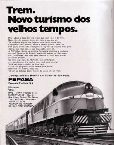 Anúncio publicitário da Fepasa sobre os trens de longo percurso.